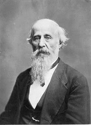 Norman Kittson